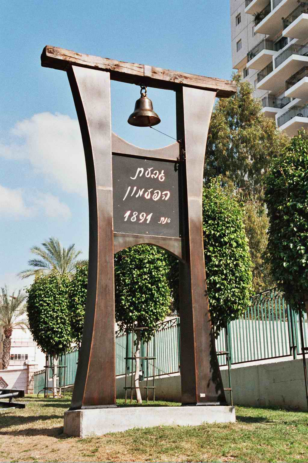 עבודת ברזל בנפחים. פסל: ישראל פרימו 200 ס"מ